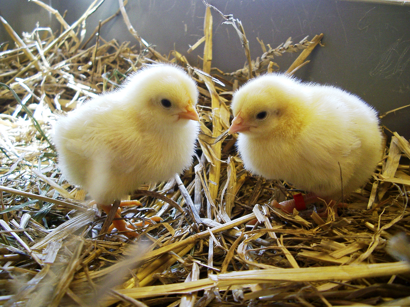 Das Bild ist Teil eines Bildvergleiches zweier zum gleichen Zeitpunkt geschlüpfte Küken einer Legehybridlinie (linkes Küken im Bild) und einer Masthybridlinie (rechtes Küken im Bild) im Alter von 3 bis 34 Tagen. Mit zunehmendem Alter wachsen die Tiere immer mehr auseinander. Nach vier Wochen wiegt ein Legeküken, das am selben Tag geschlüpft ist wie ein Mastküken, nur gerade halb soviel.Nach 40 Tagen, sind die Mastküken schon schlachtreif, die Legeküken haben noch kaum Fleisch angesetzt. Das Mastküken ist schon vor Ende der Mastzeit nicht mehr fähig, für eine Foto ruhig neben dem Legeküken zu stehen. Es wiegt zuletzt rund 1,8 kg und kann seinen enormen Fleischberg und die übermässige Brust kaum mehr tragen und sinkt immer gleich nieder ein. Beschreibung und Bilder stammen aus folgendem Artikel: 3. Tag 12. Tag 18. Tag 29. Tag 34. Tag